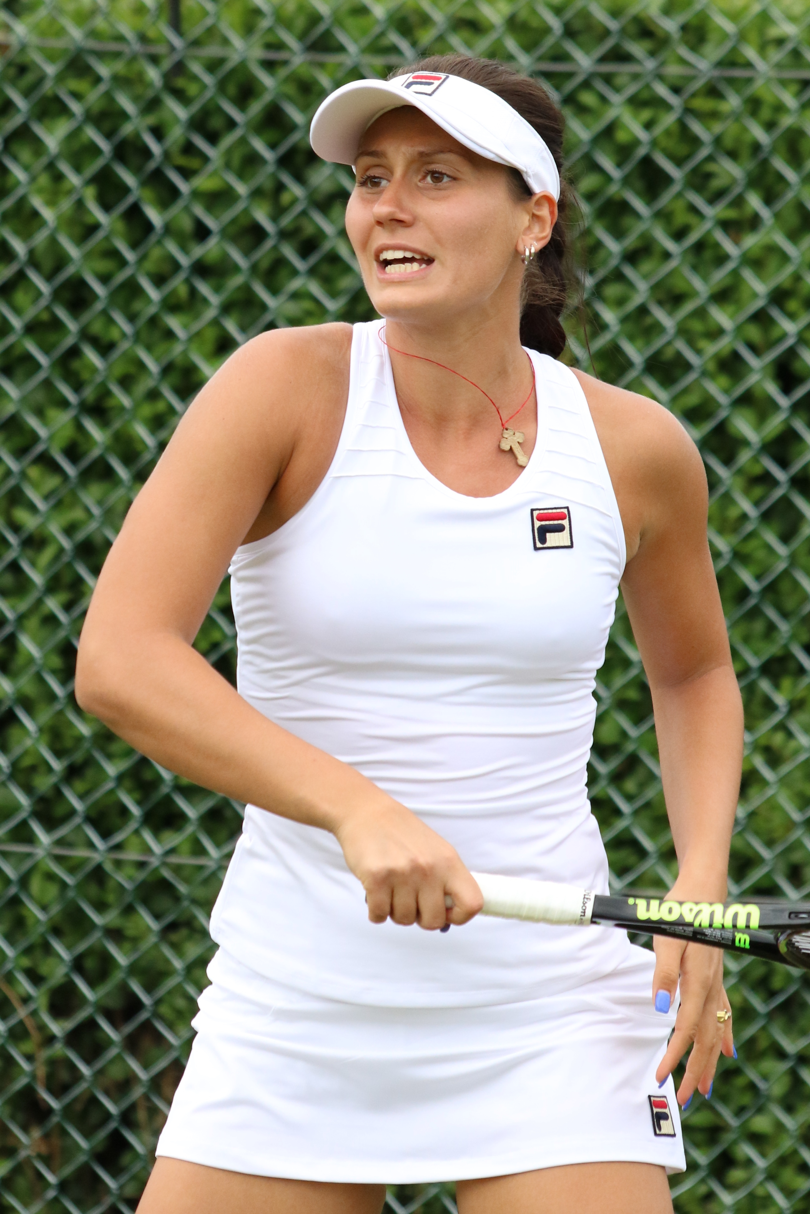 Jaksic WMQ16 (1)